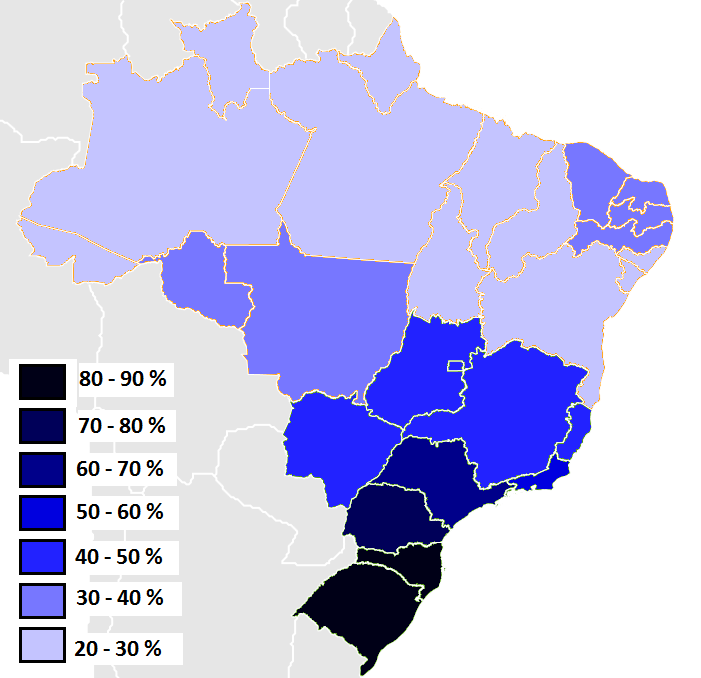 Percentagem de Brancos por estado Brasileiro. Fontes